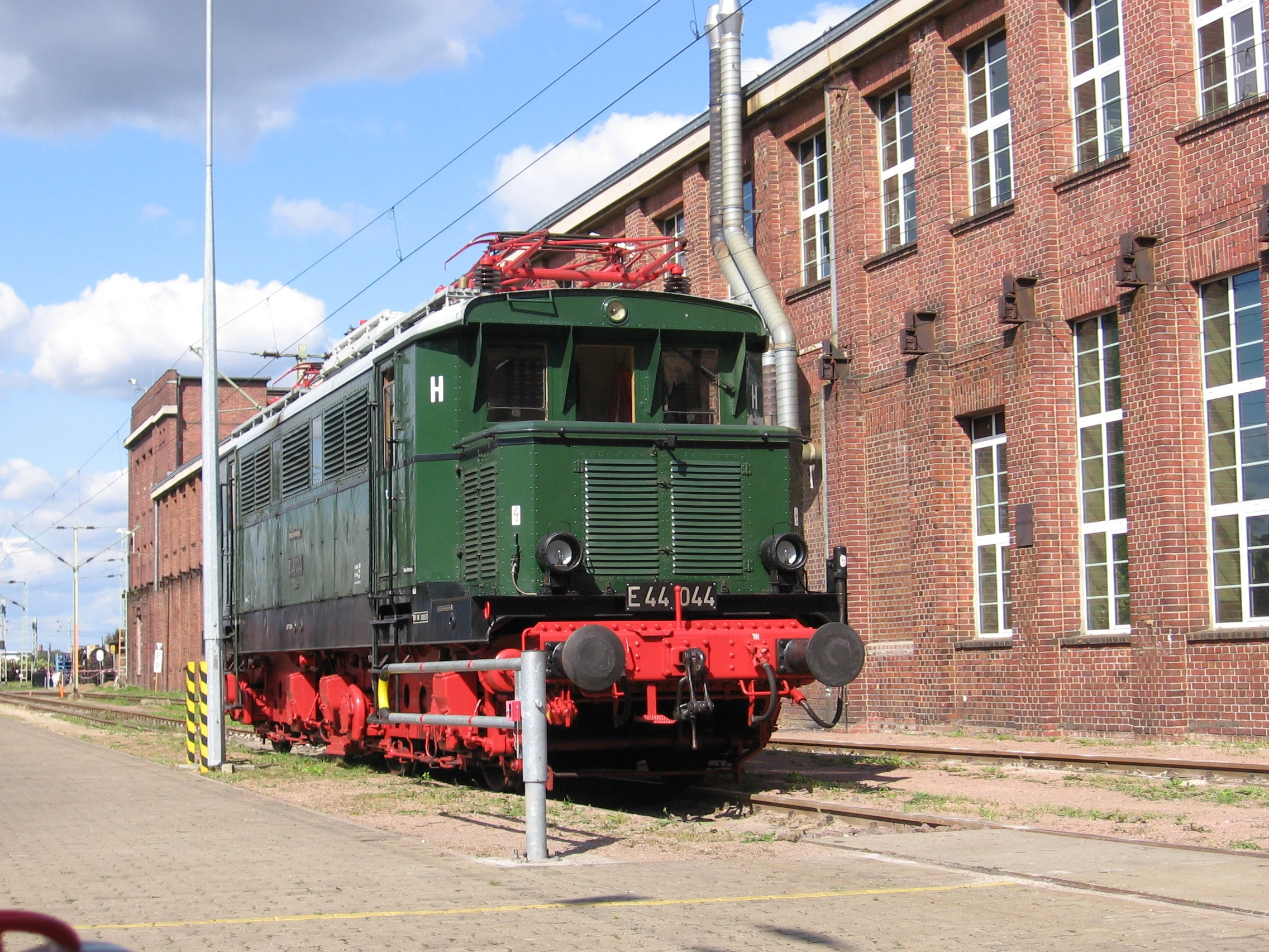 Elektorlokomotive E44 044 im Ausbesserungswerk Dessau, Sommer 2009